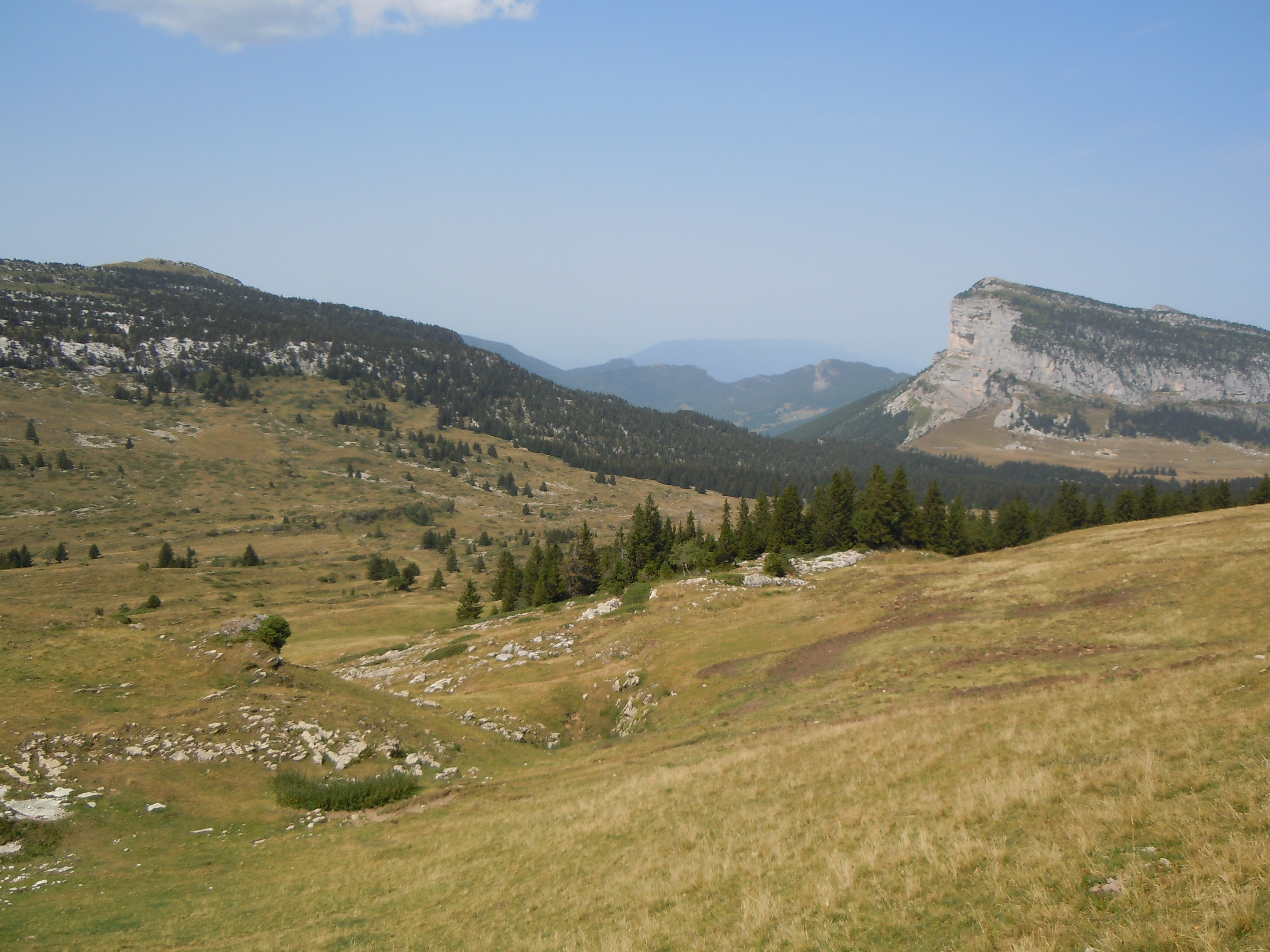 Col de l'Alpette et Mont Granier depuis la Croix de l'Alpe - Réserve naturelle des Hauts de Chartreuse